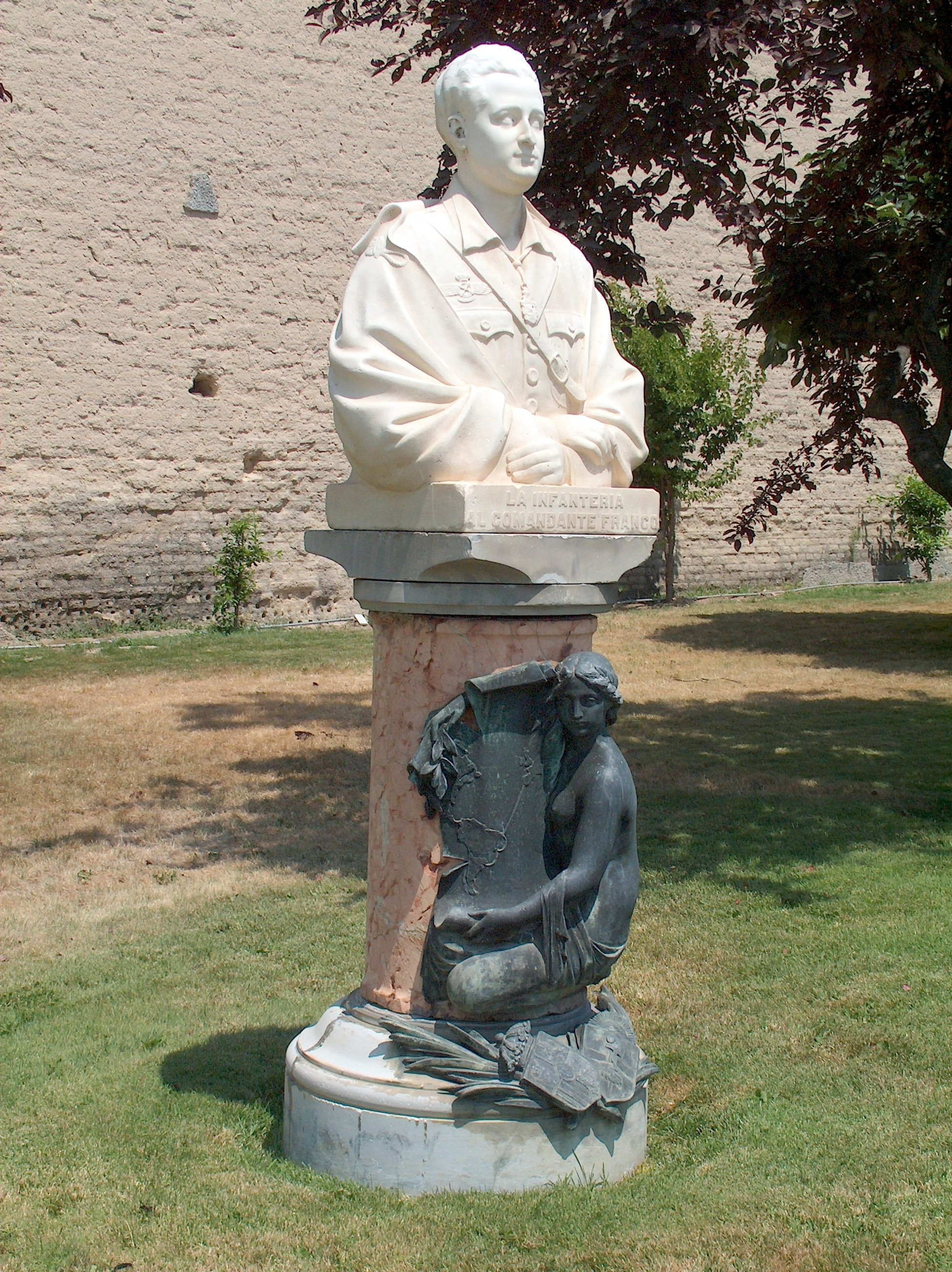 Ramón Franco : Busto en el Museo del Aire de Cuatro Vientos (Madrid, España).